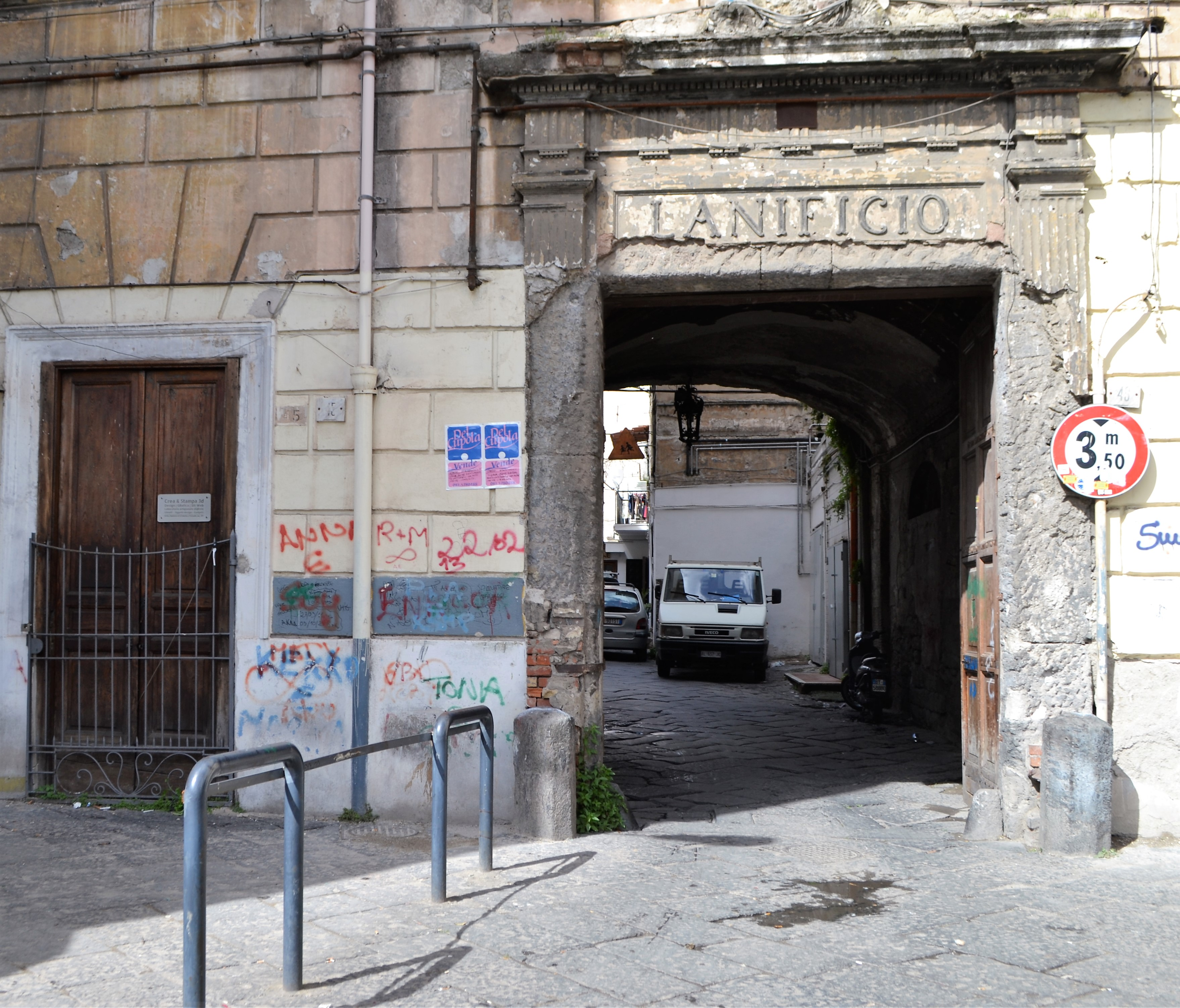 Accesso all'ex Lanificio Militare - Complesso monastico di Santa Caterina a Formiello di Napoli